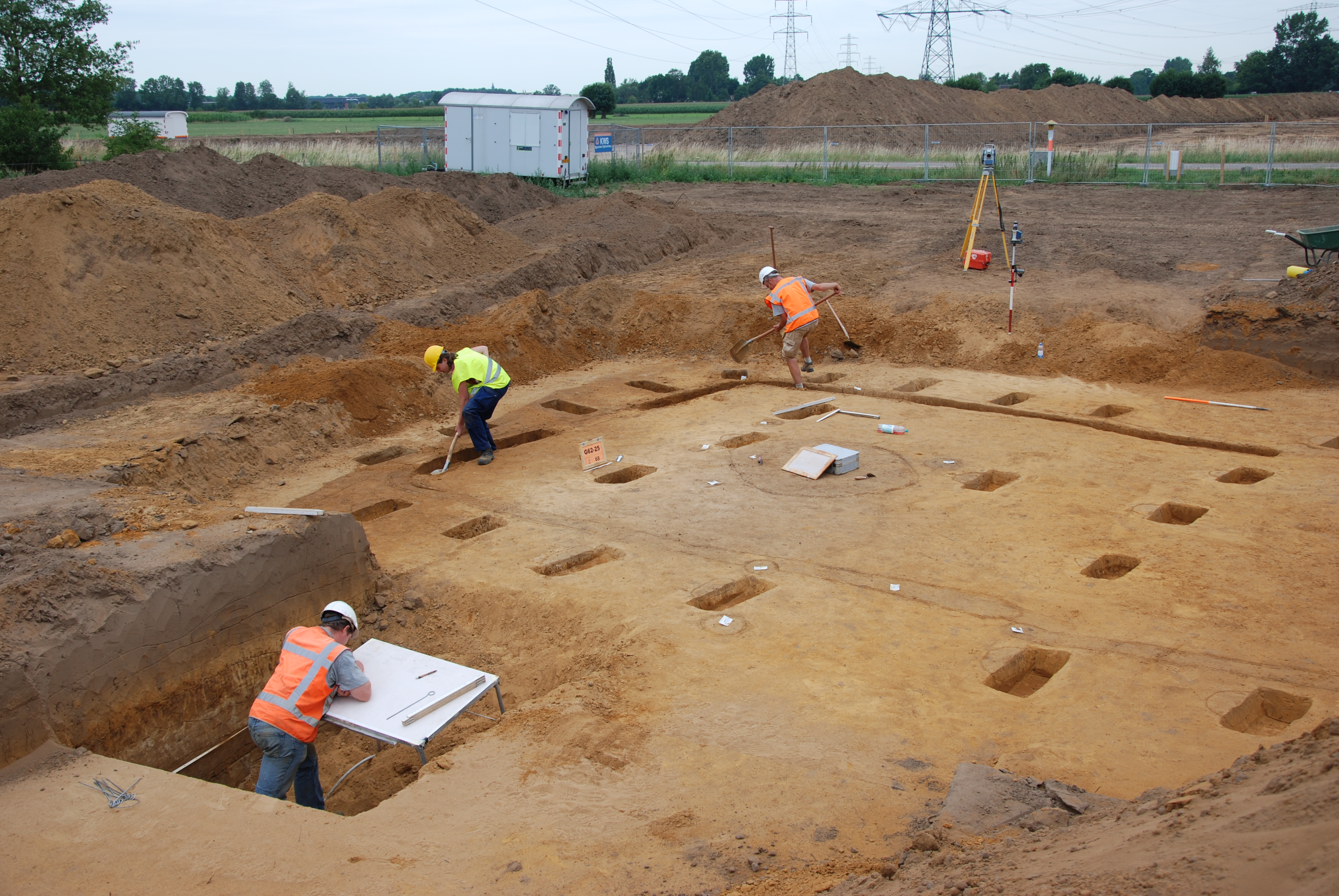 Opgraving huisplattegrond uit IJzertijd te Vierakker (Gelderland) door RAAP Archeologisch Adviesbureau.